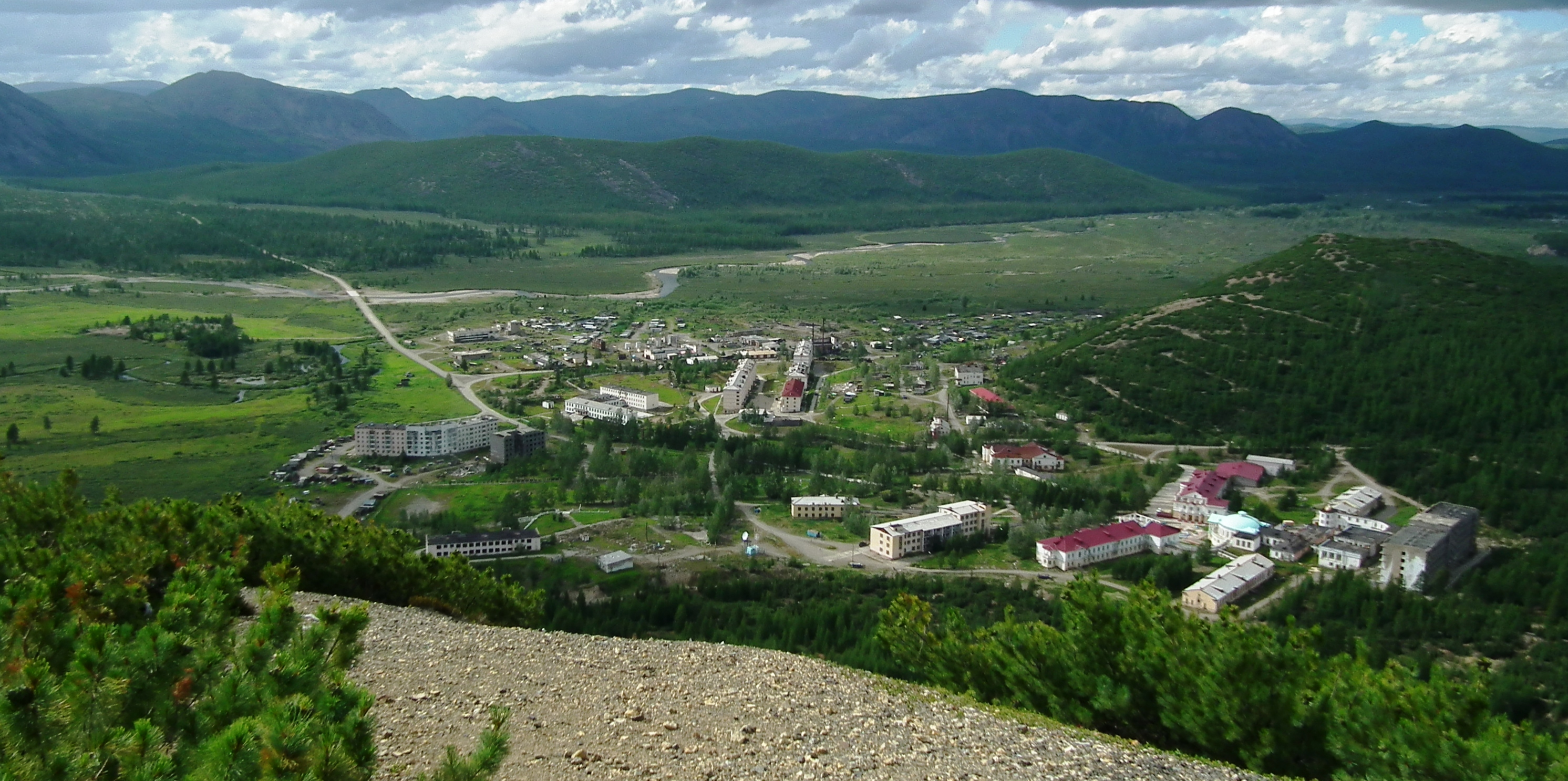 Россия, Магаданская область, посёлок Талая